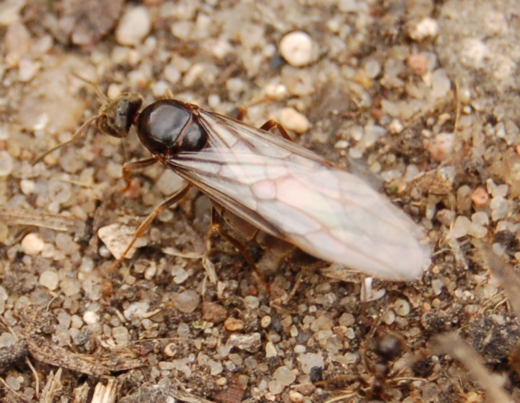 Prince fourmis de type Lasius (?)